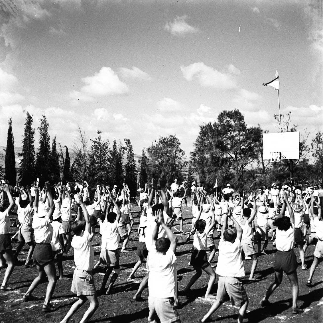 אוסף צילומים של הצלם זולטן קלוגר טווח מספרי התשלילים 29701 - 29783: חגיגות היובל (25 שנים) לעין חרוד - מופע ספורט